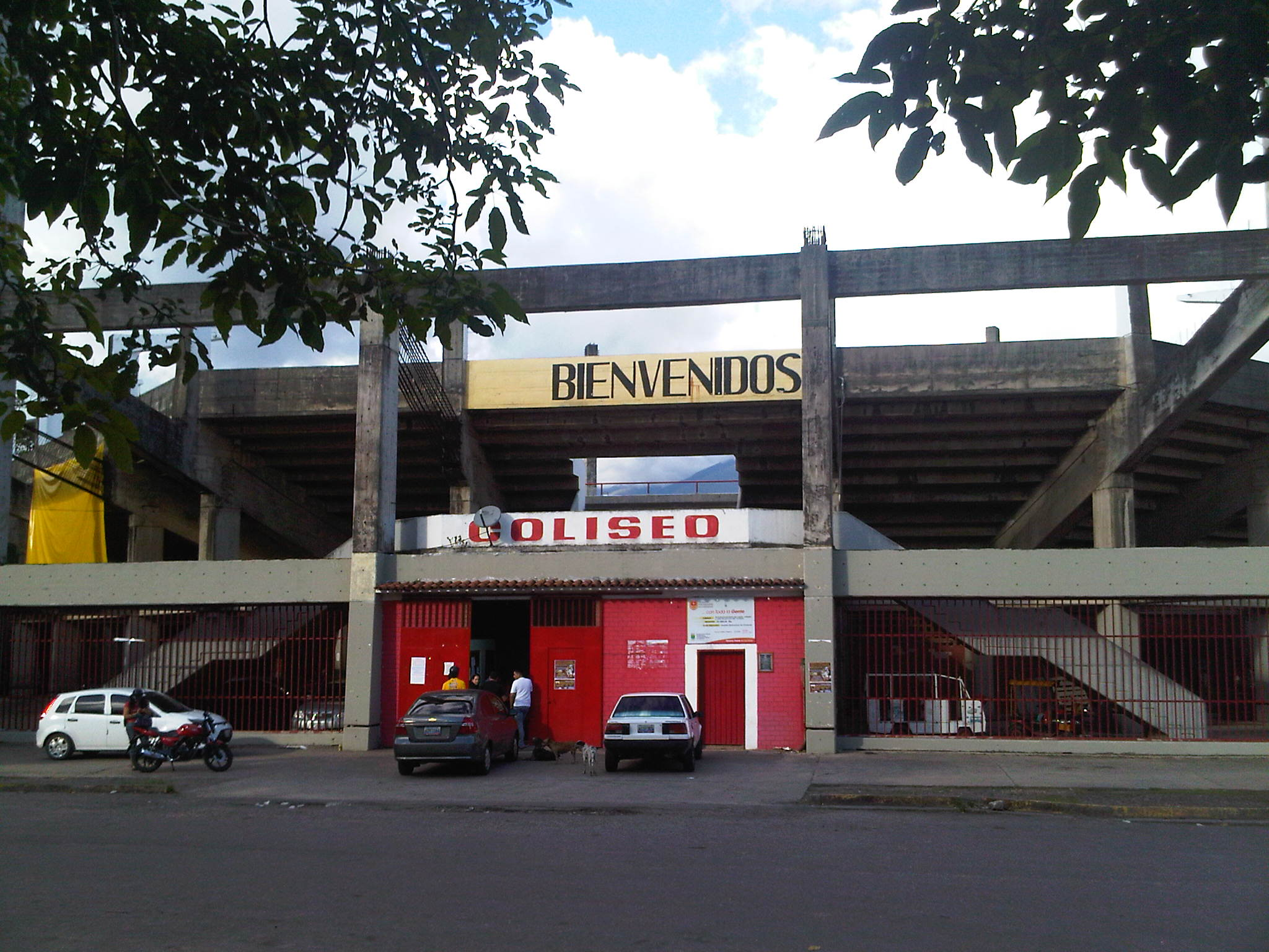 Vista de la Entrada de la Plaza de Toros Coliseo Perla del Torbes de Táriba